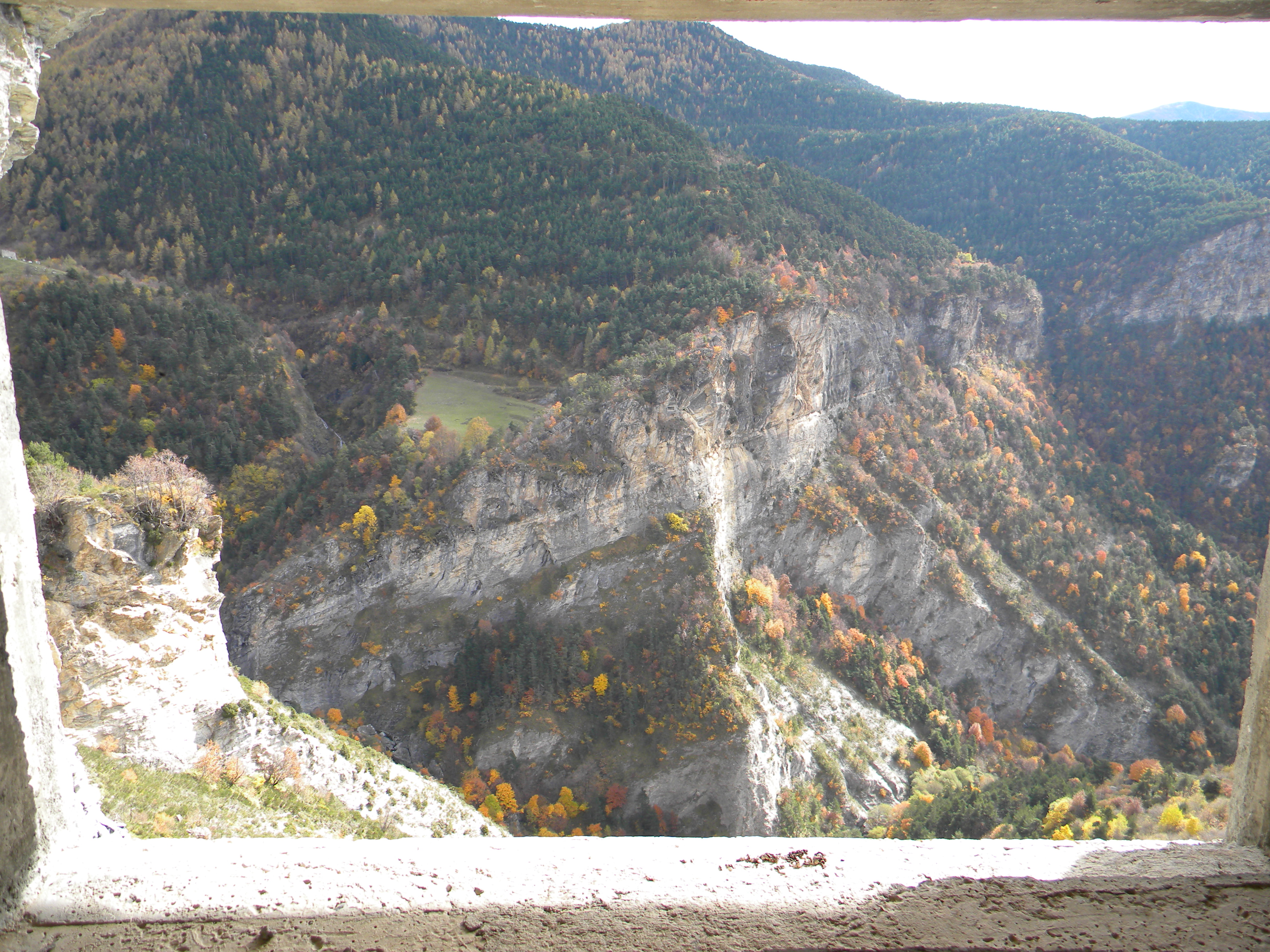 Roberto Manfredi (Riotforlife), fonte personale, foto scattata il giorno 07/11/'09 dall'interno del forte di Castel Tournou